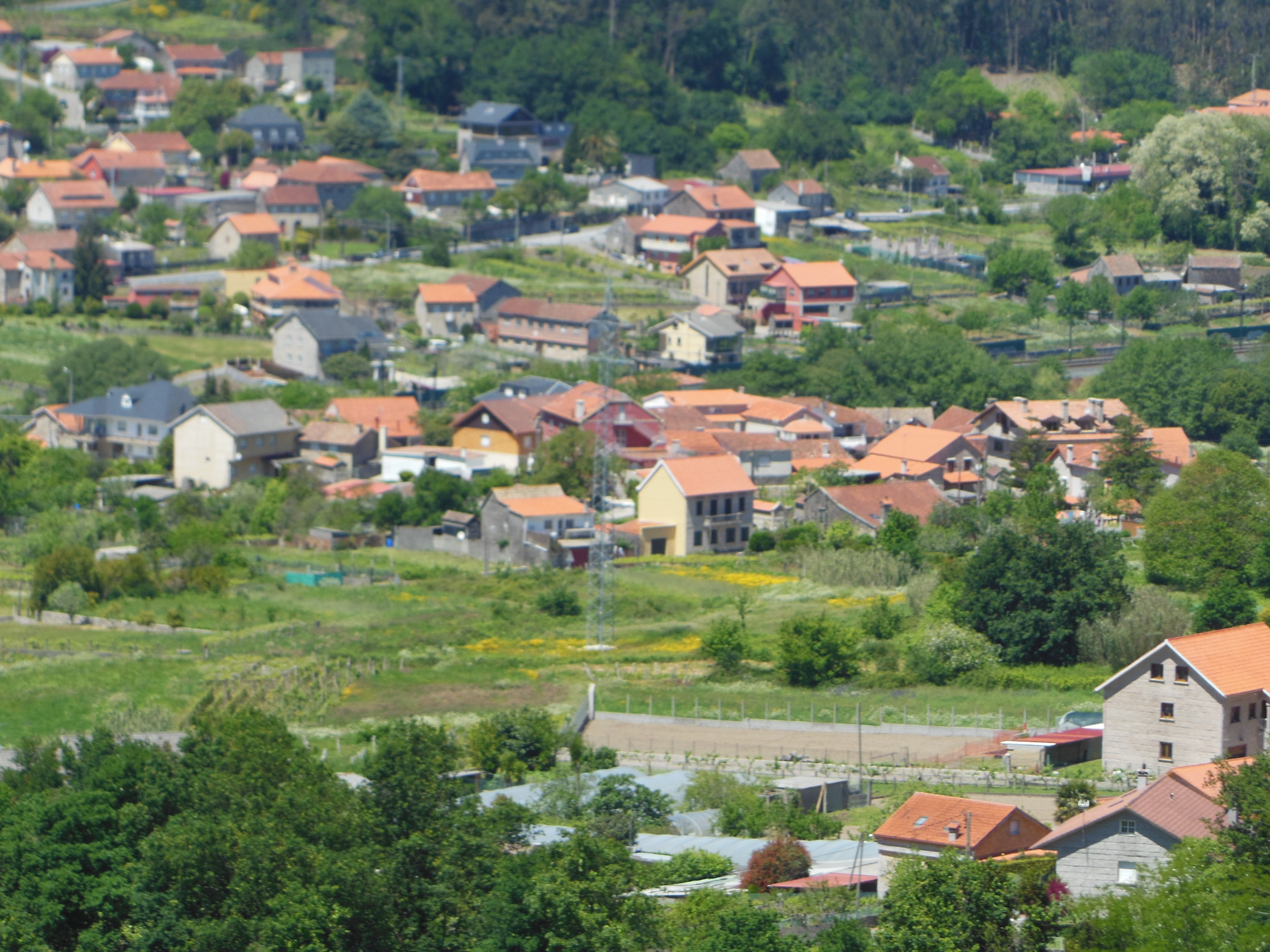 Vista da aldea do Alcouce desde A Canicouva